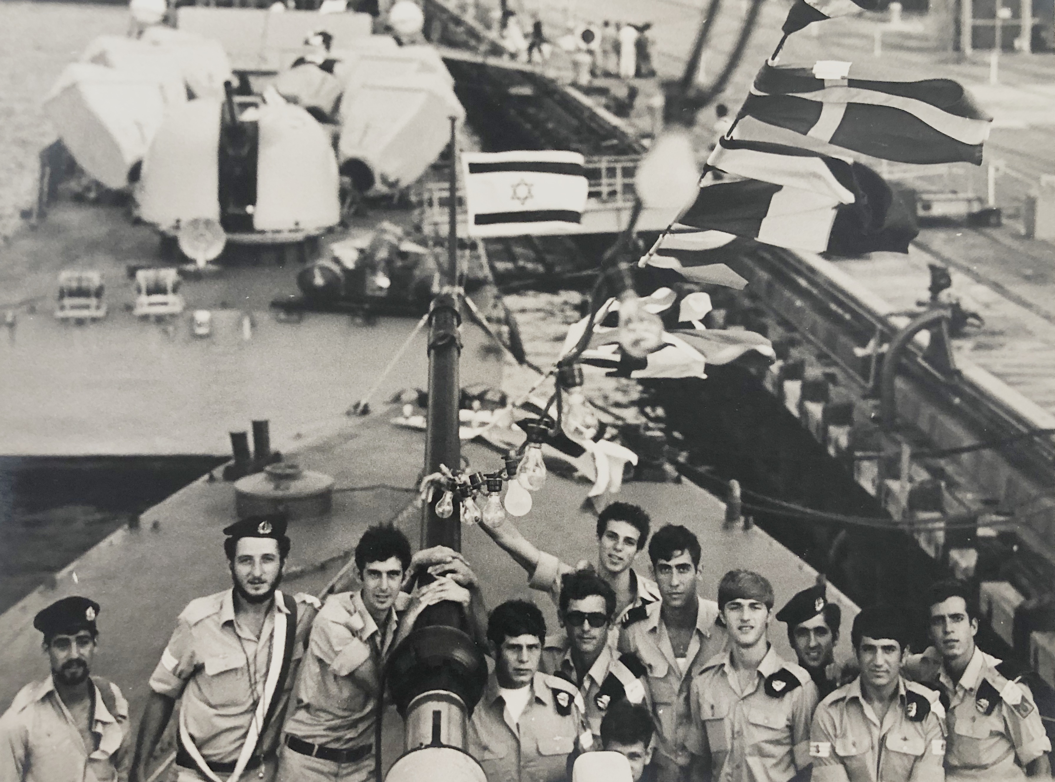 צוות אח"י תרשיש סער 4 בעת עגינת הספינות בפילדלפיה במסגרת מבצע פעמון החירות יולי 1976